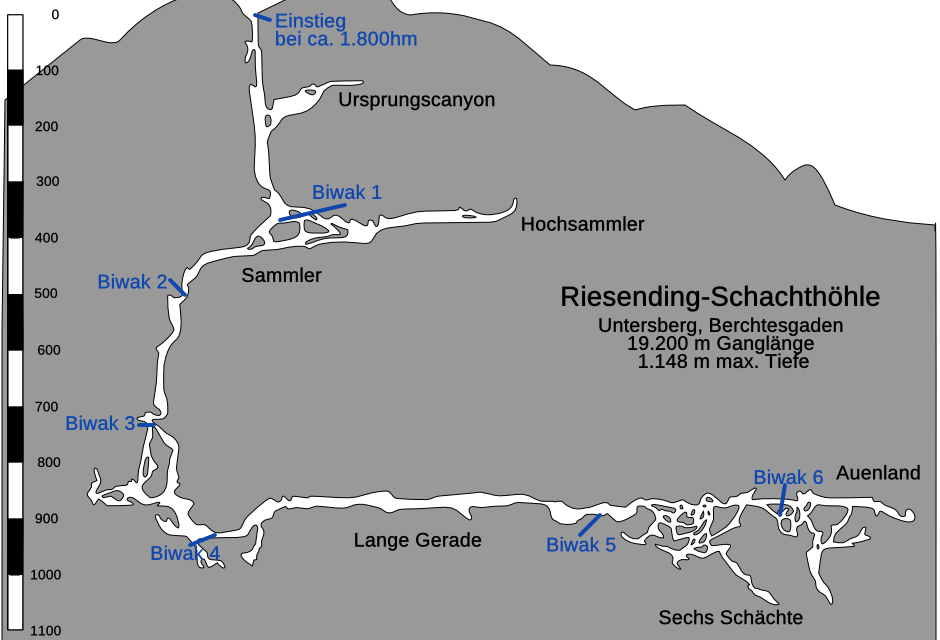 Aufriss der Riesending-Schachthöhle, Stand: Januar 2014